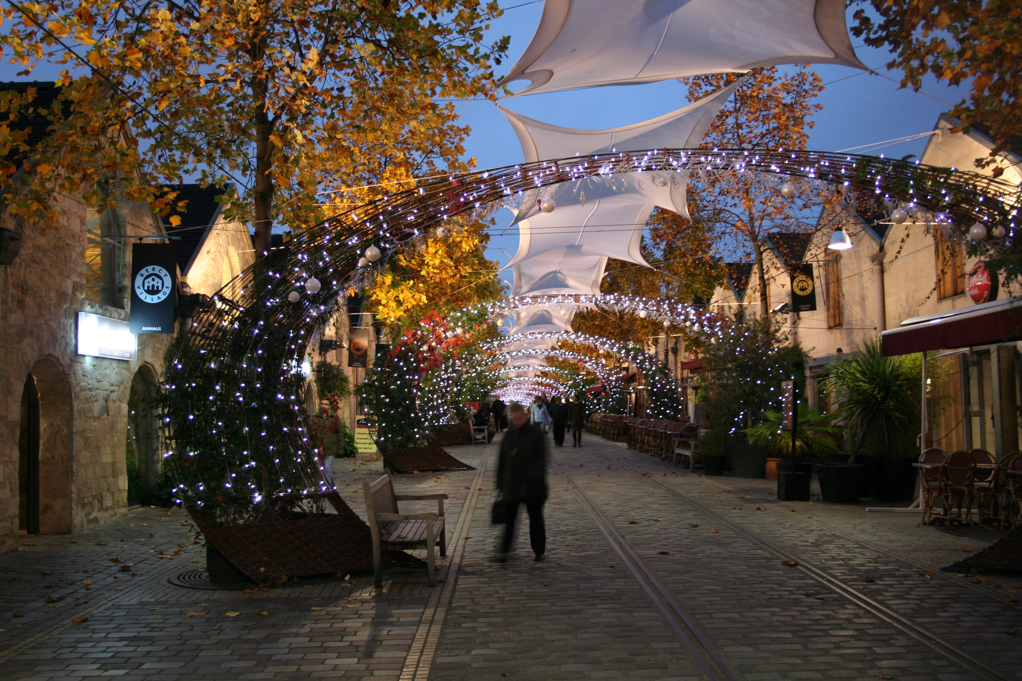 La cour Saint-Émilion à Bercy Village (Paris, France).